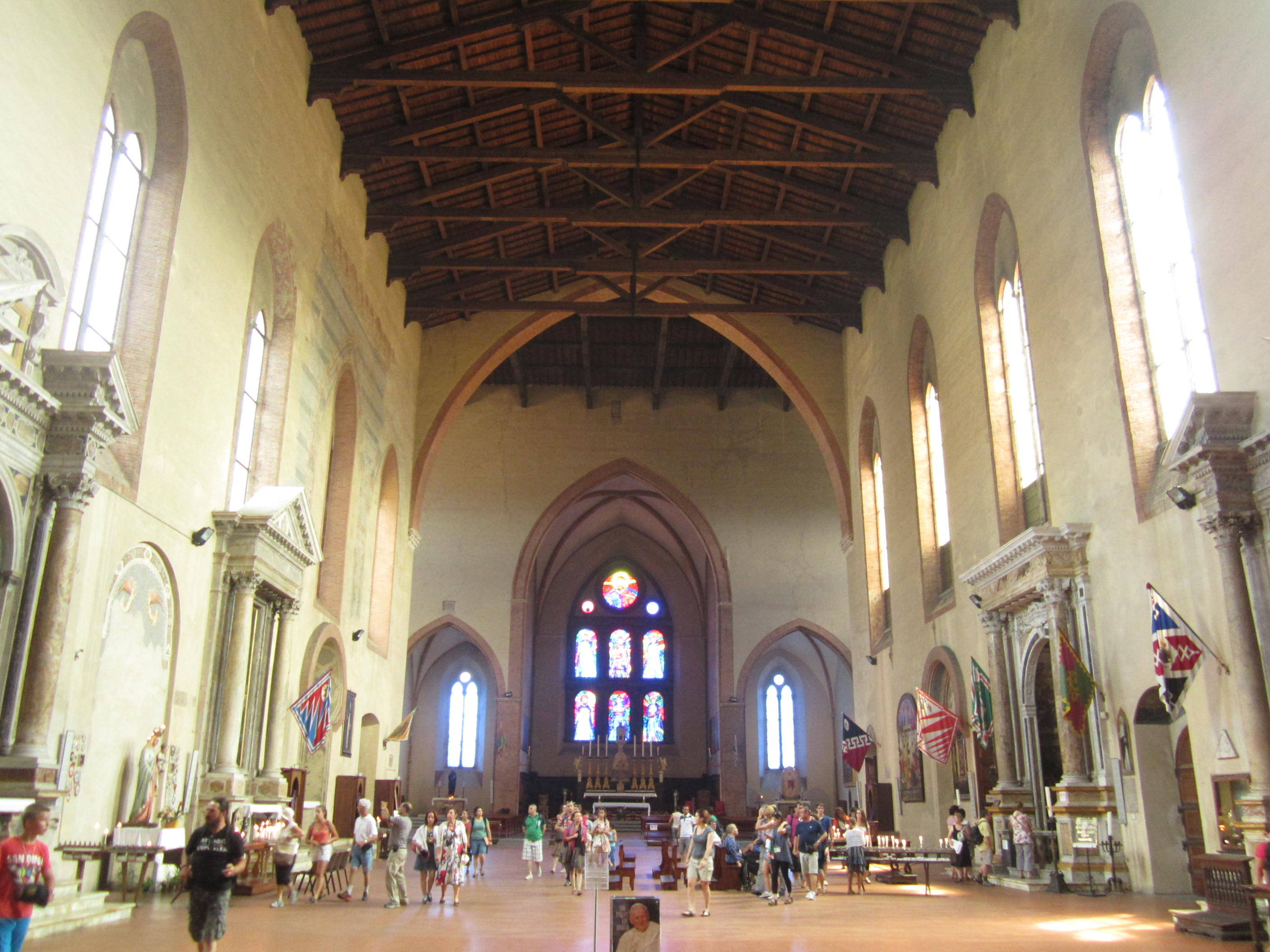 Interno della Basilica di San Domenico a Siena